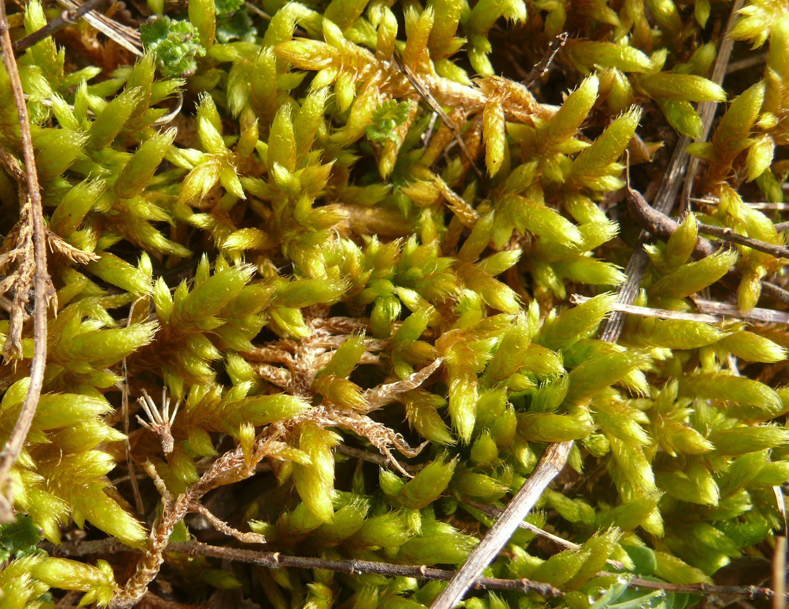 Rhytidium rugosum, Tauberland, Deutschland